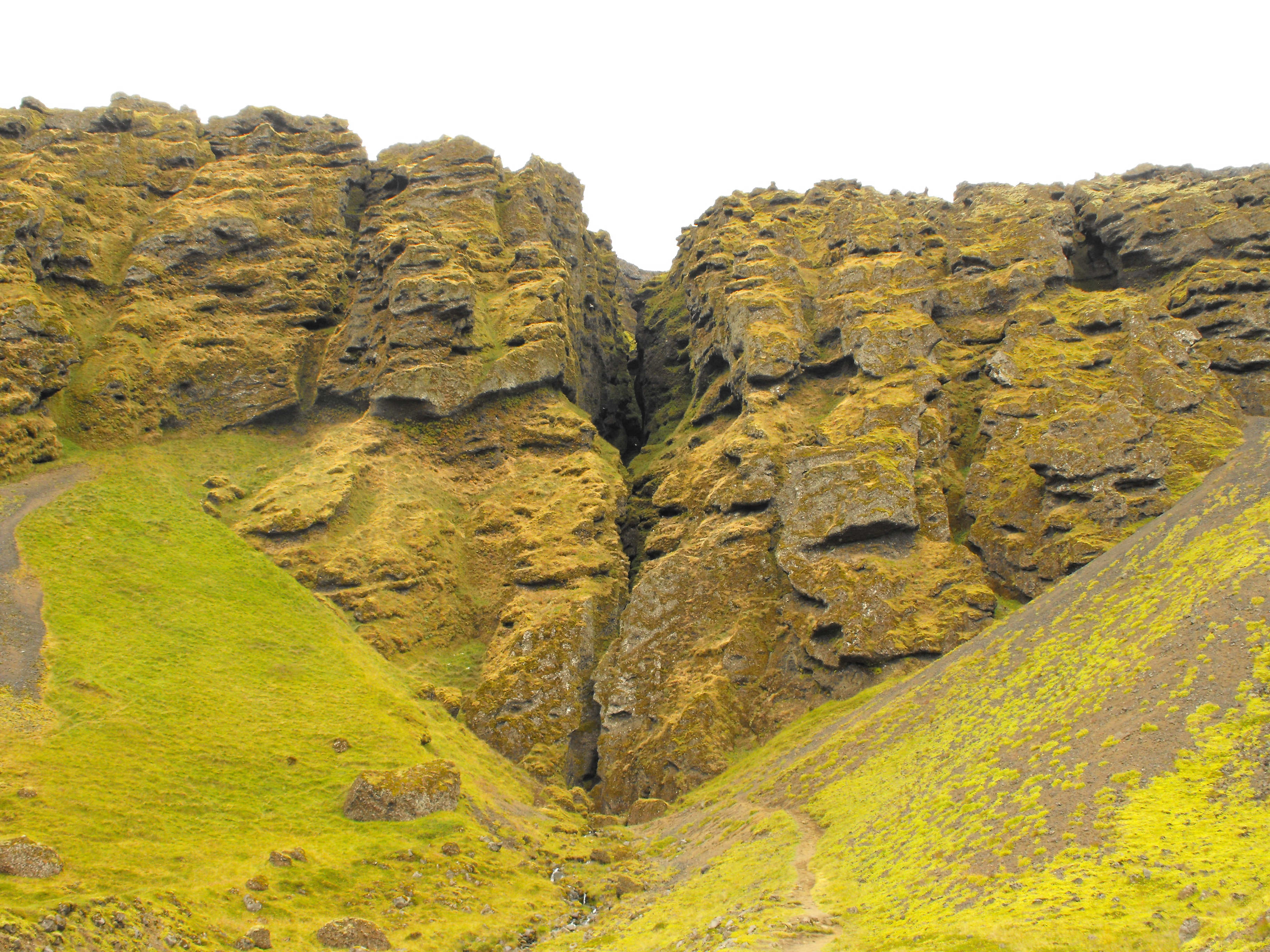 Raudfelgljukur - Iceland